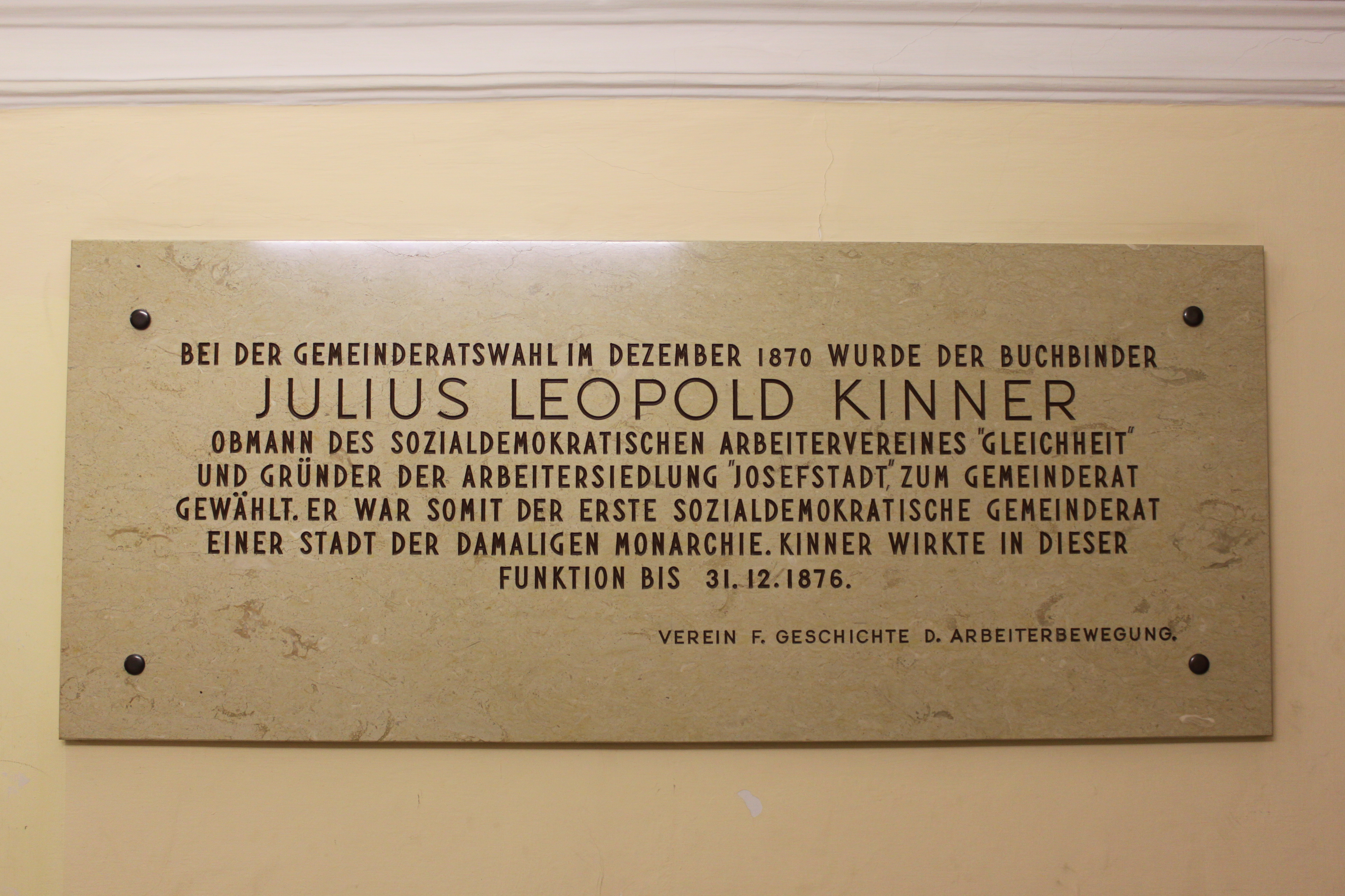 Rathaus Wiener Neustadt, Gedenktafel zu Julius Leopold Kinner, im Erdgeschoss im Durchgang zur Stiege